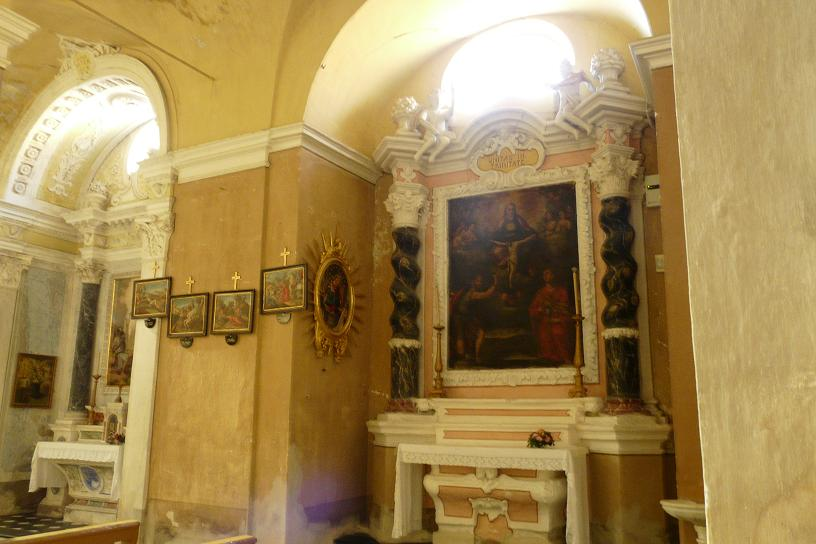 Chiesa di Santa Margherita d'Antiochia, Diano Arentino, Liguria, Italia